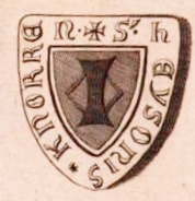 Nachzeichnung eines Abdrucks des Siegels des Heiso Knorren auf einer Urkunde von 1357 (Urkunde CXXIII.). Randbeschriftung: S[IGILLVM] HEYSORIS KNORREN.